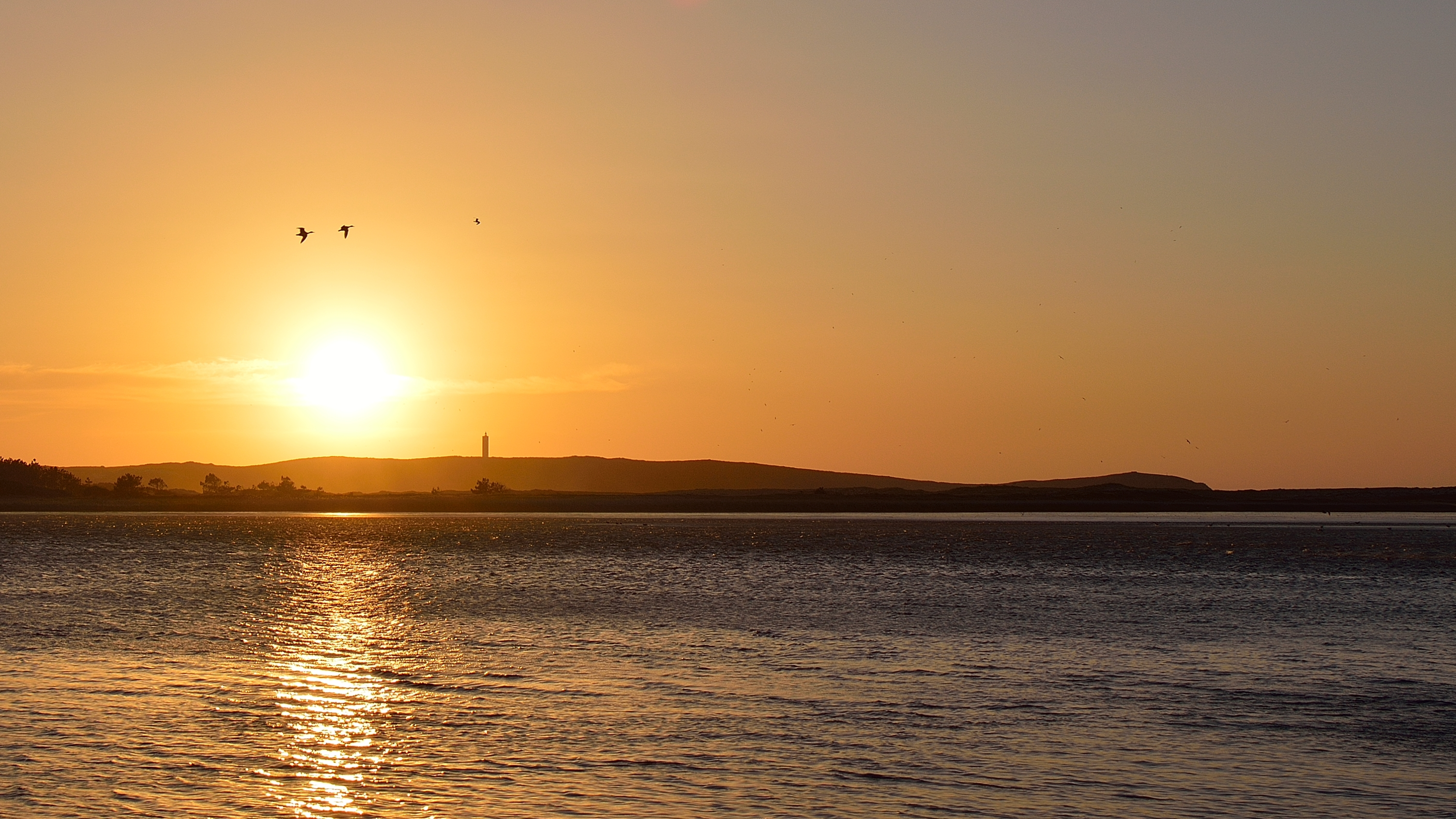 Lagoa da Frouxeira, en Valdoviño. Lugar de paso de aves migratorias